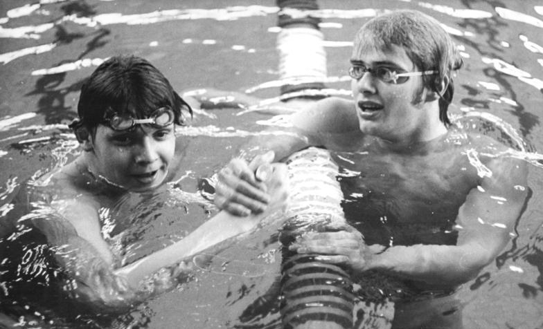 Frank Pfütze, Rainer Strohbach ADN-ZB Mittelstädt 2.6.76 Berlin: 27. Meisterschaften der DDR im Sportschwimmen (2.Tag)-Einen Europrarekord gab es über 400 m Freistil mit 3:58,59 min durch den neuen Titelträger Frank Pfütze (SC Dynamo Berlin-links). Mit 3:58,69 min blieb auch der Zweitplazierte Rainer Strohbach (TSC Berlin-rechts) noch unter der alten Rekordmarke des sowjetischen Schwimmers Wladimir Raskatow; der am 12.3.76 in Tallinn 3:59,60 min geschwommen war.